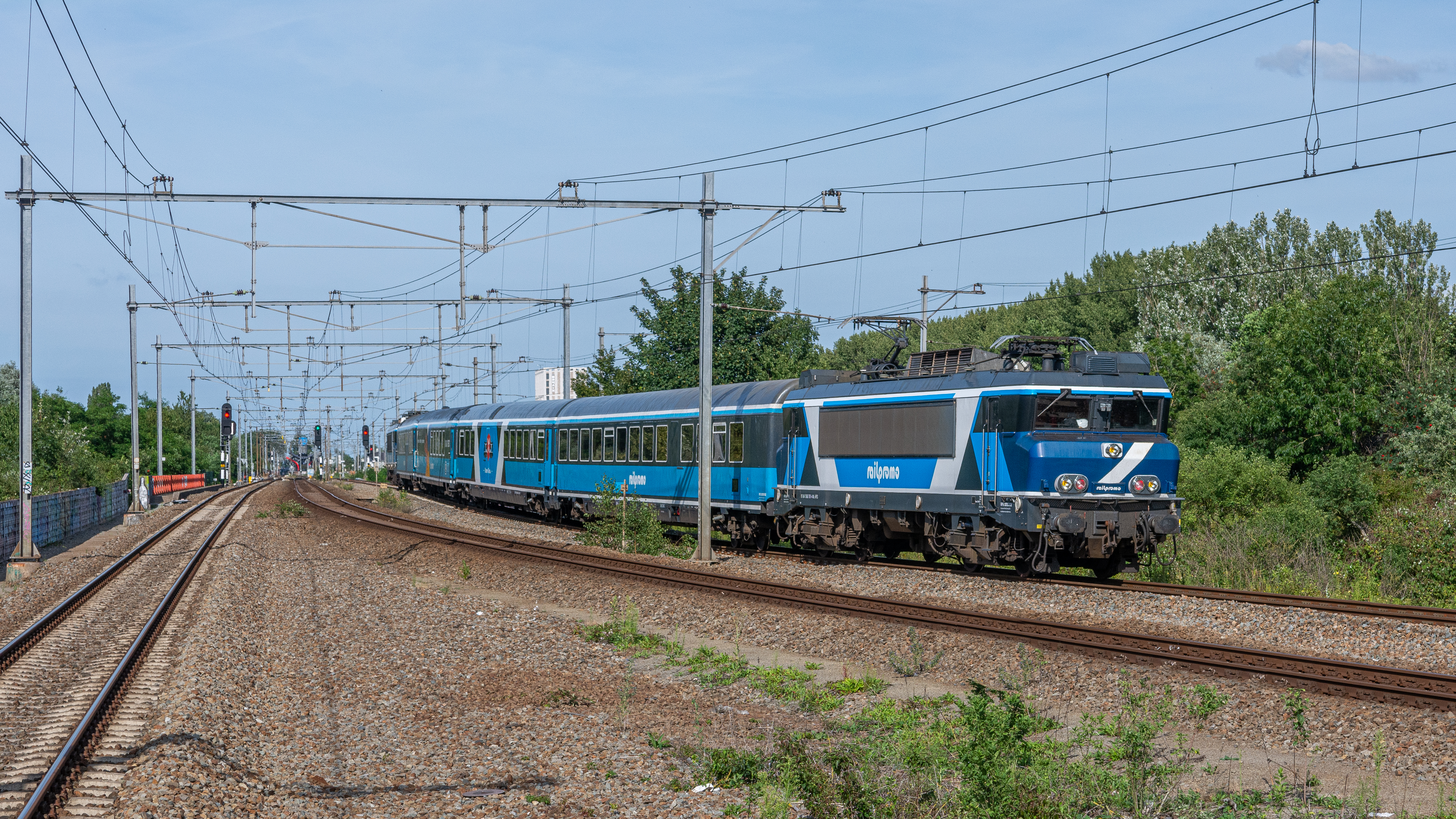 In de boog richting Bijlmer Arena bij station Duivendrecht rijdt de Railpromo Dinertrain. De trein is in Amersfoort gestart en gaat via Weesp - Breukelen naar Utoz. Dan maakt hij kop en gaat weer naar Amersfoort terug.